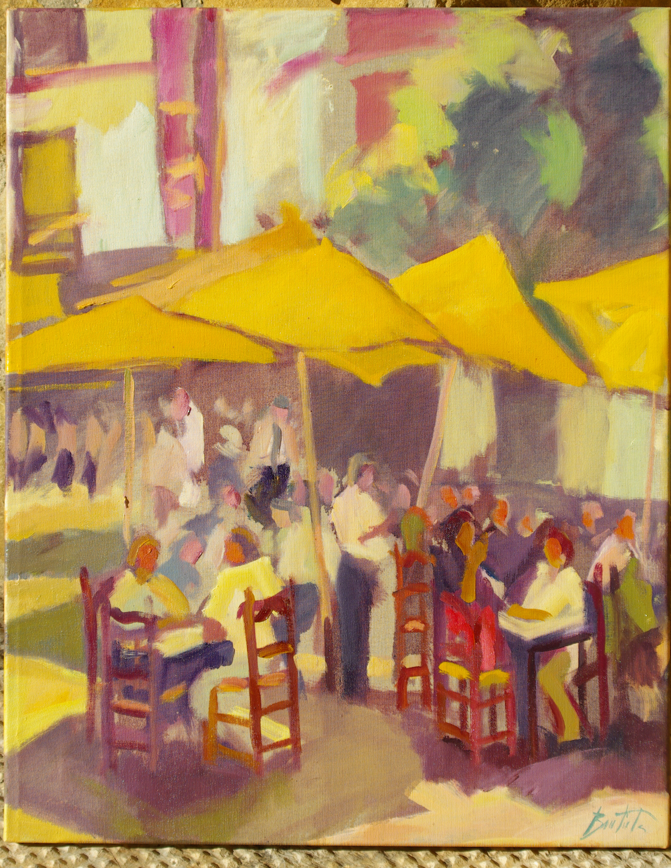 "Ensalada de primavera" óleo/lienzo 92 x 73 cm.